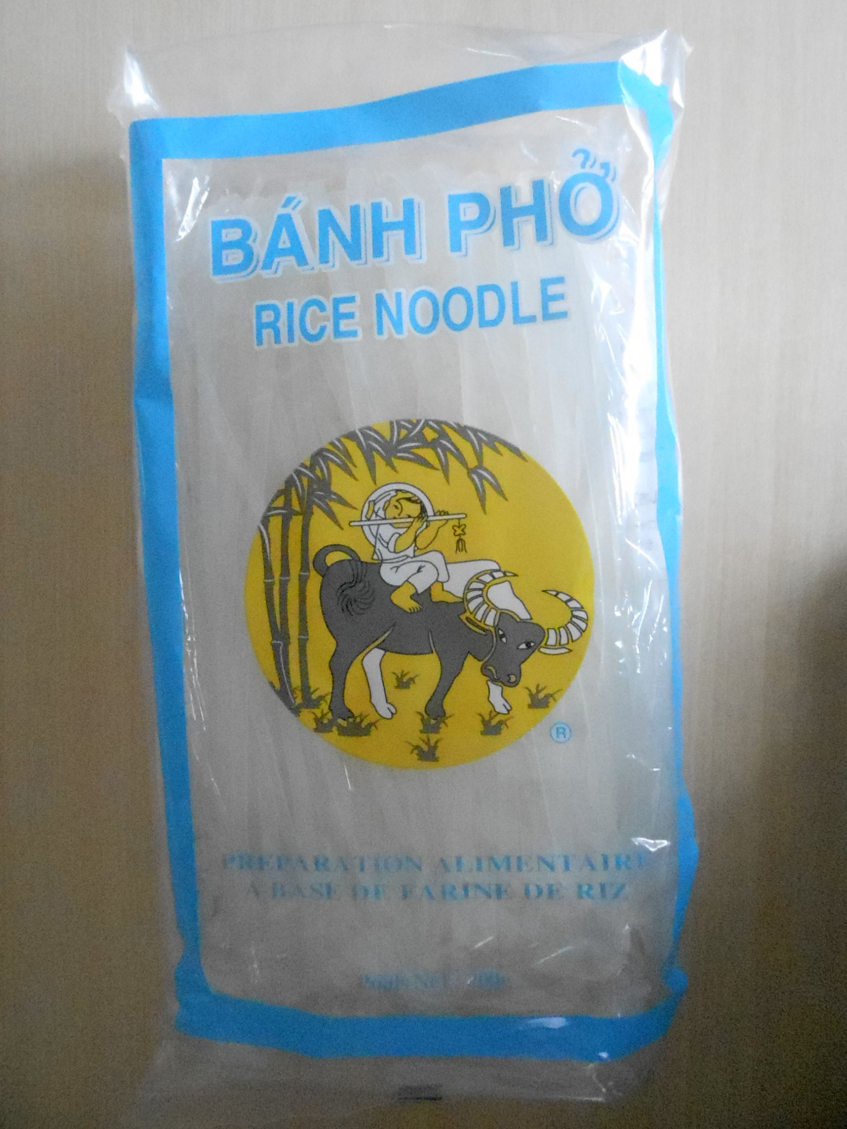 フォーという米粉でできた麺。ベトナムで食べられている。これは日本のユウキ食品が発売している物。